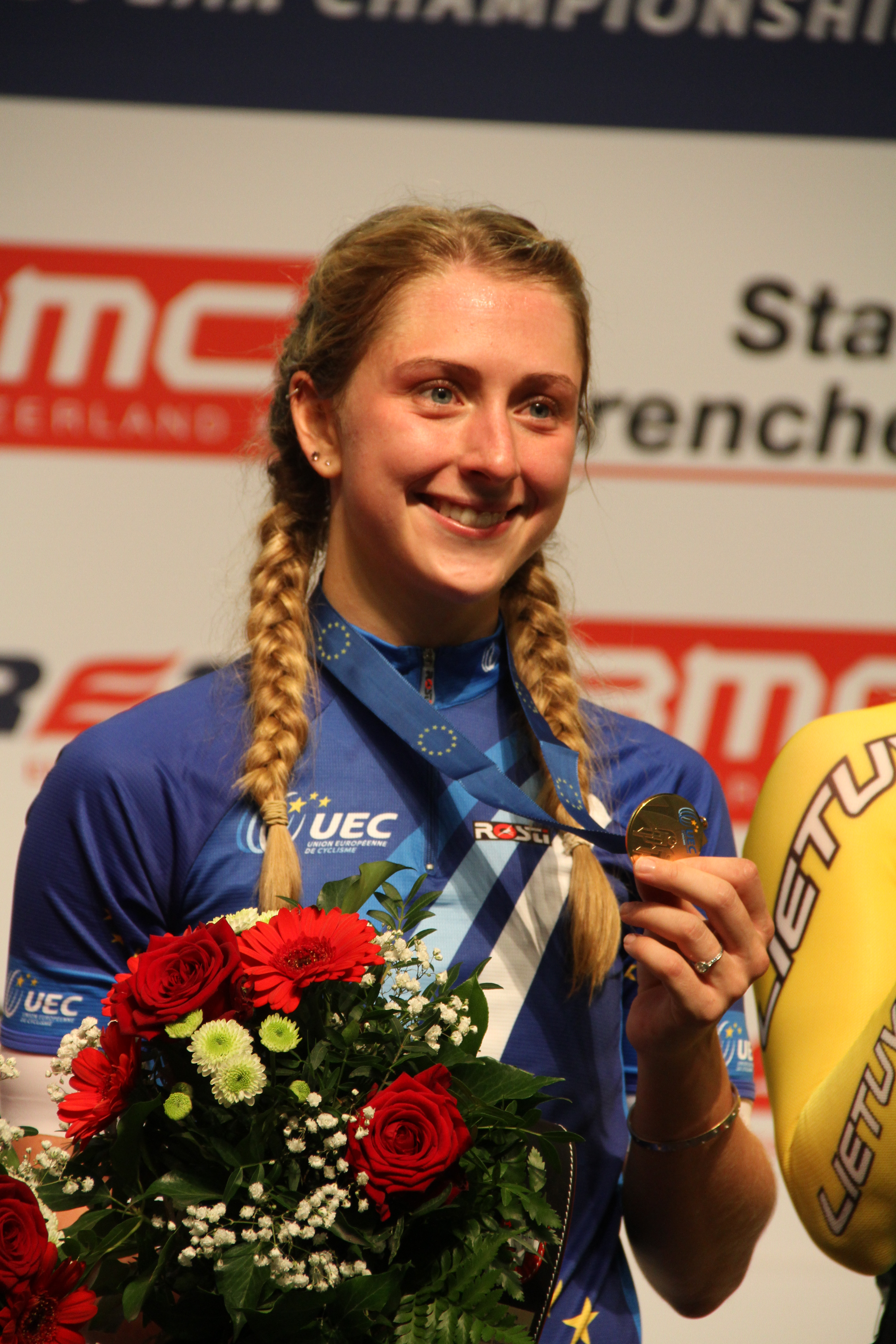 Laura Trott, britische Radsportlerin, Europameisterin im Omnium The making of this document was supported by the Community-Budget of Wikimedia Germany.